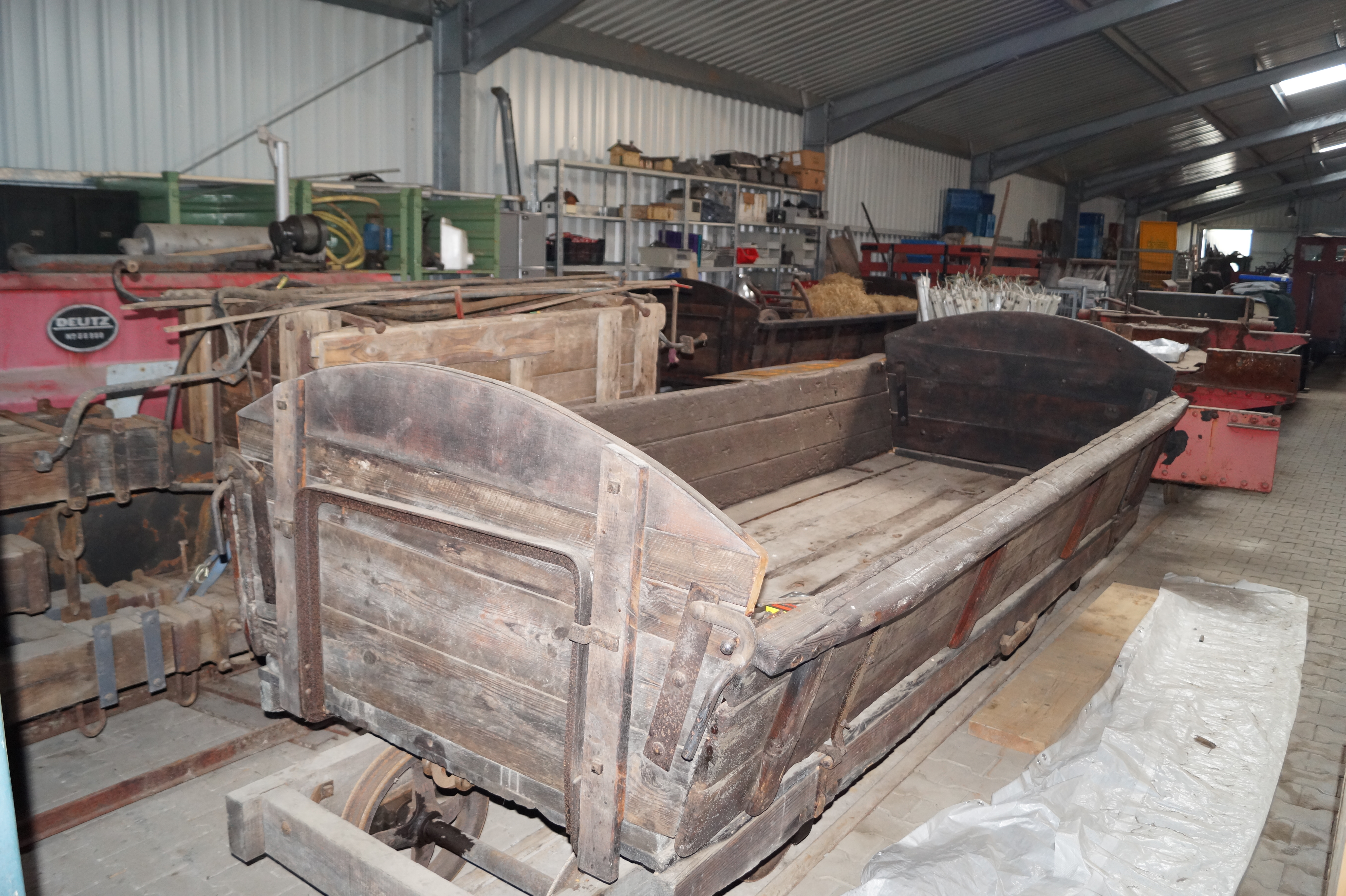 Frankfurter Feldbahnmuseum 2018